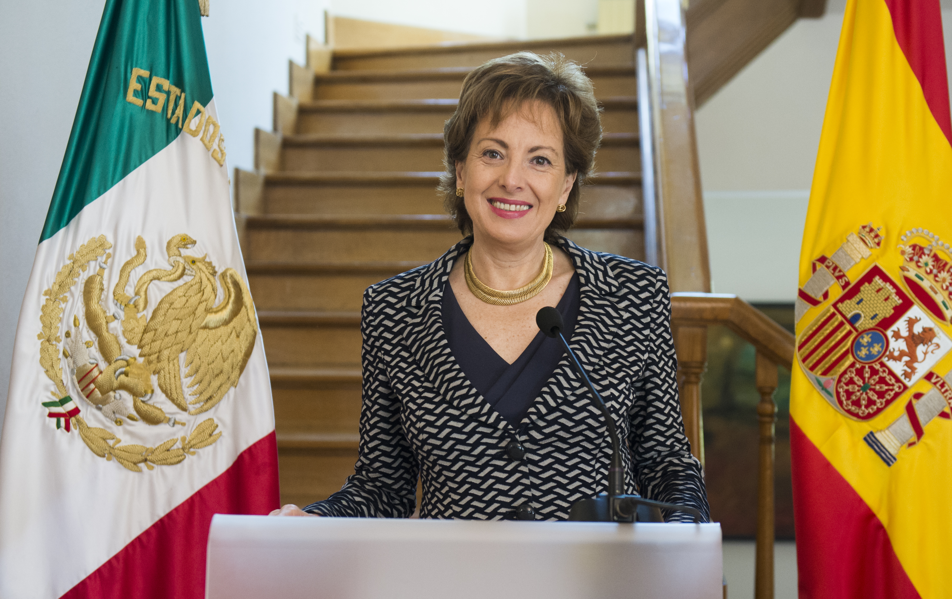 Mujeres diplomáticas de México.